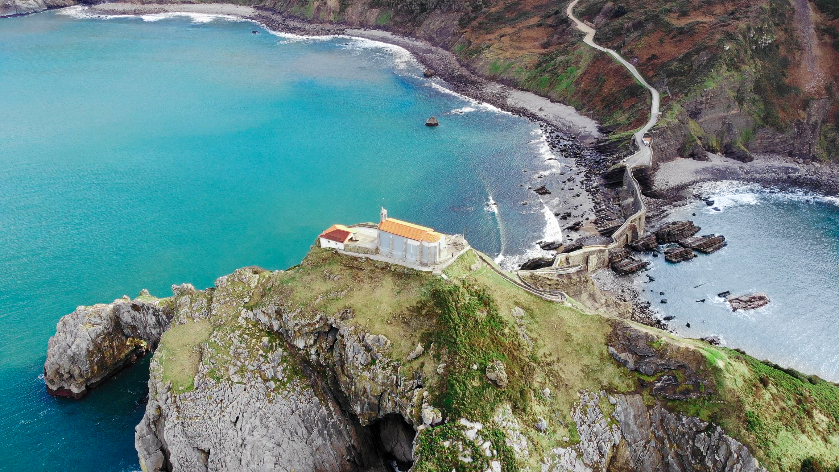 Gaztelugatxe au drone